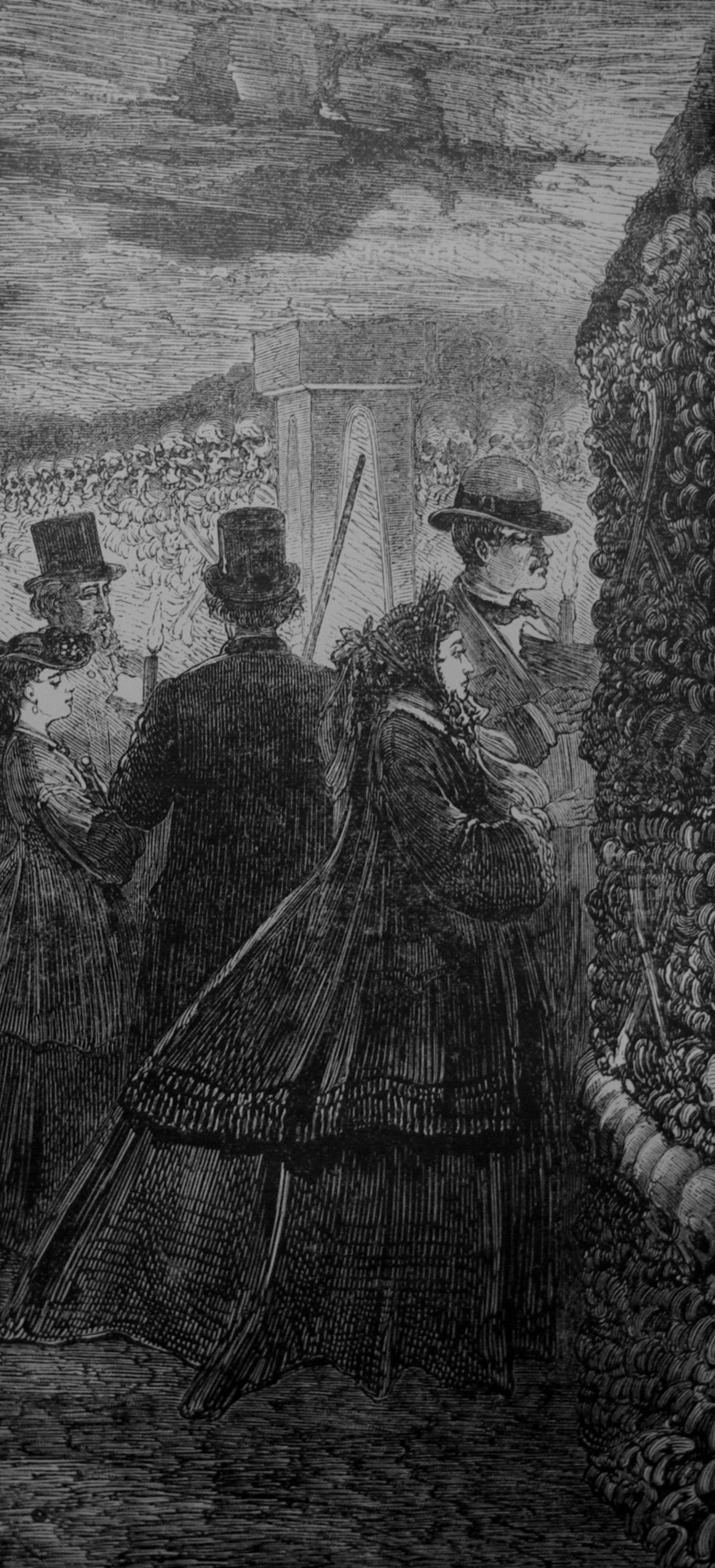 Besucher in den Katakomben von Paris, um 1860